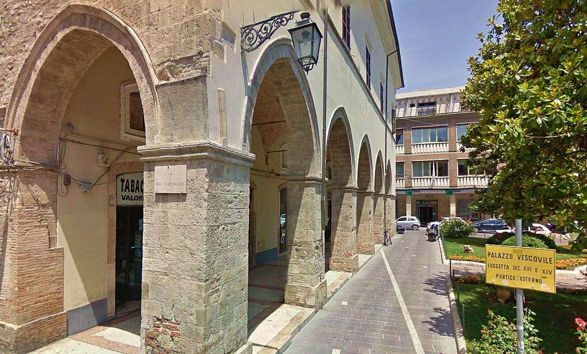 I Portici del Palazzo Vescovile, in Piazza Orsini